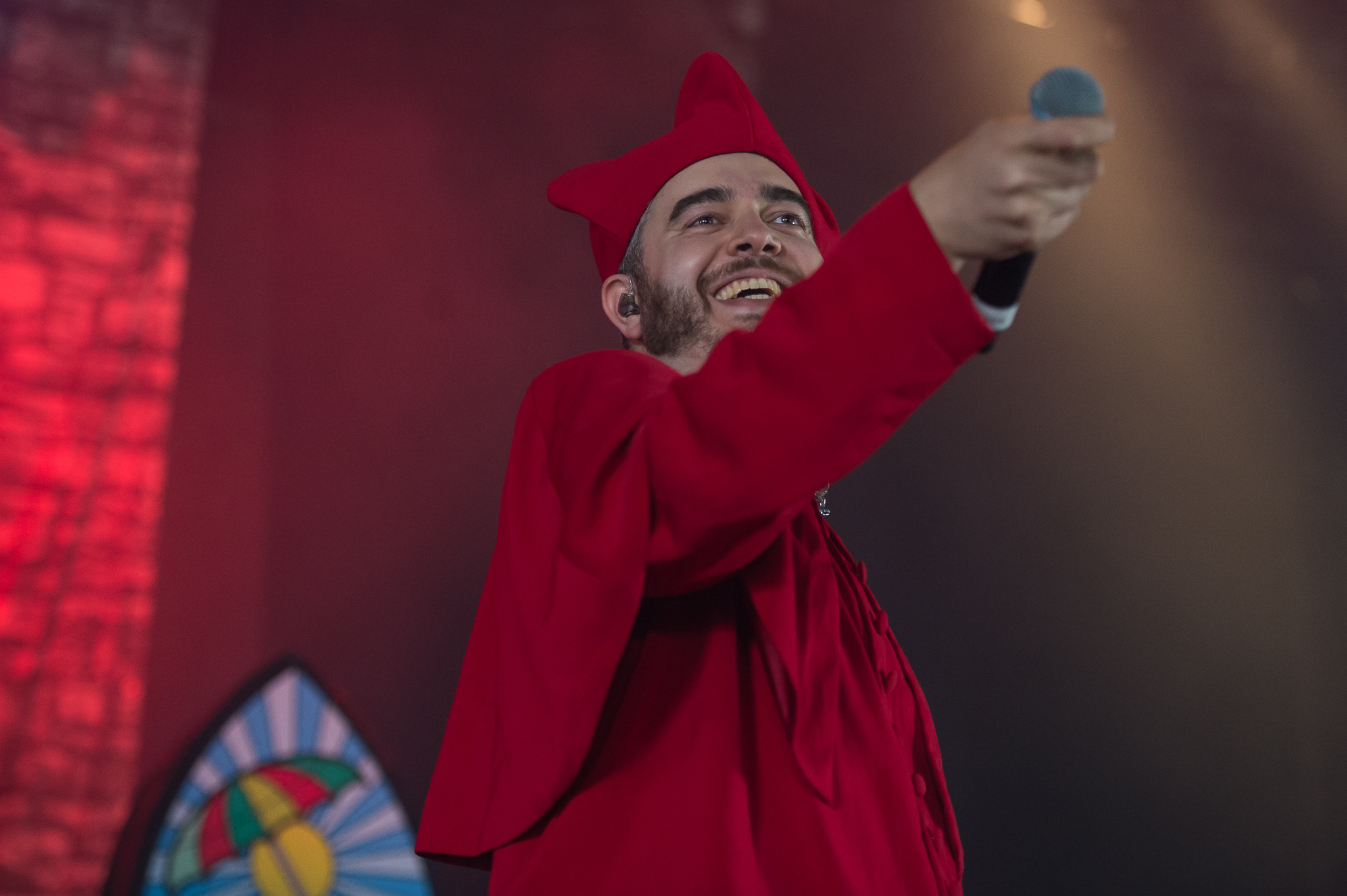 Audio88 & Yassin,Deichbrand,ESK Events & Promotion GmbH,Festival,Konzert,Livekonzert,Livemusik,Palastzelt,Sea-Airport Cuxhaven/Nordholz,See-Flughafen Cuxhaven/Nordholz,Seeflughafen Cuxhaven/Nordholz,Yassin